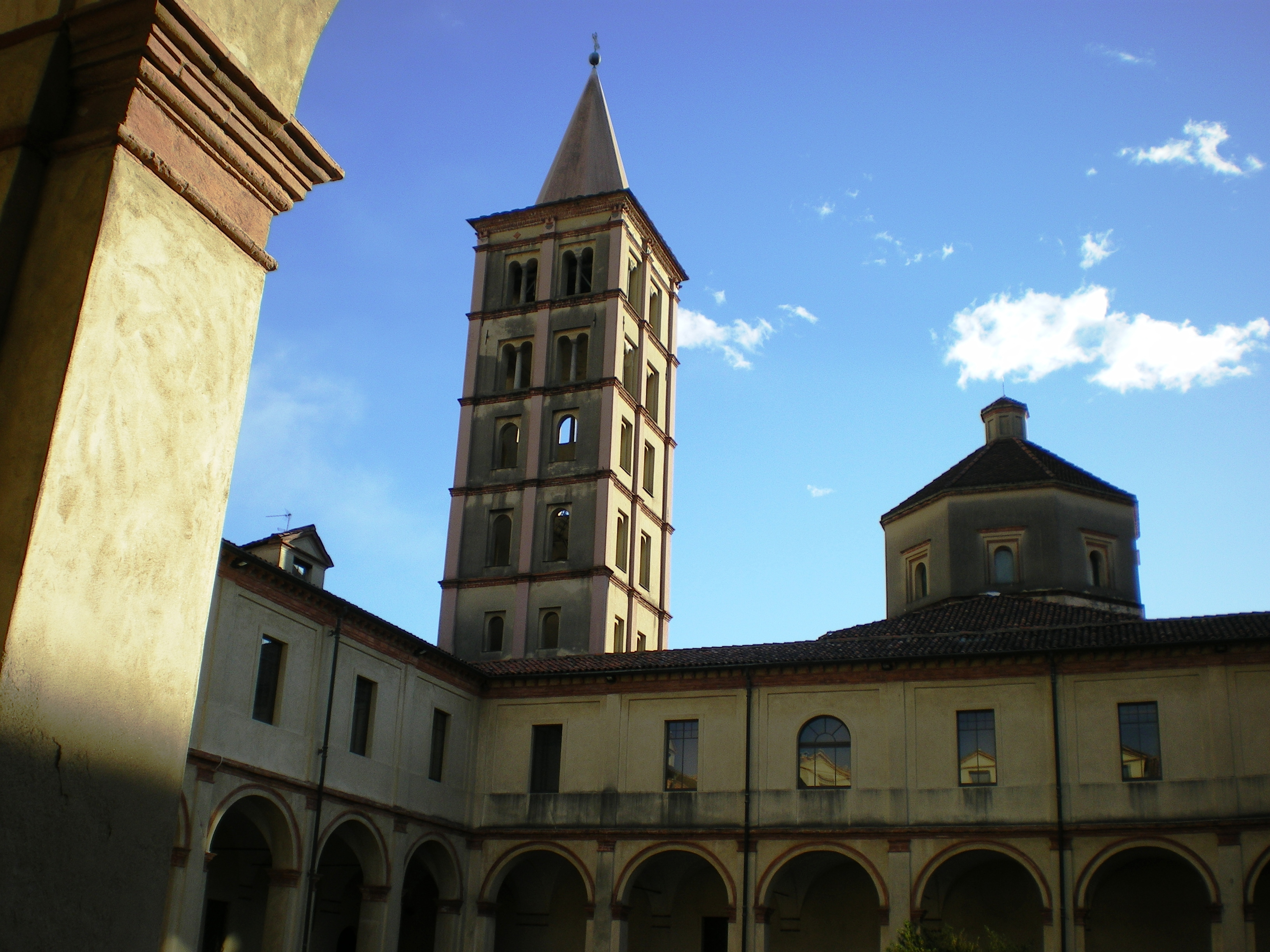 Campanile e cupola San Sebastiano visti dal chiostro